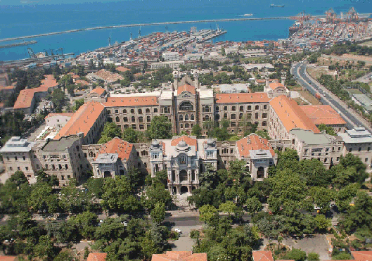 marmara hukuk-haydarpaşa kampüsü üstten görünüm